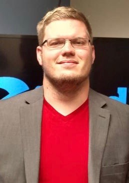 ift.tt/2csXvFa